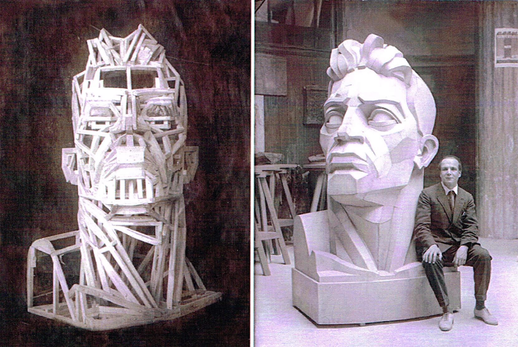 Владимир Владимирович Кудряшев (25 июля 1902, Малые Яльчики Казанской губернии, Российская империя – 09 ноября 1944, Москва). График, скульптор, живописец